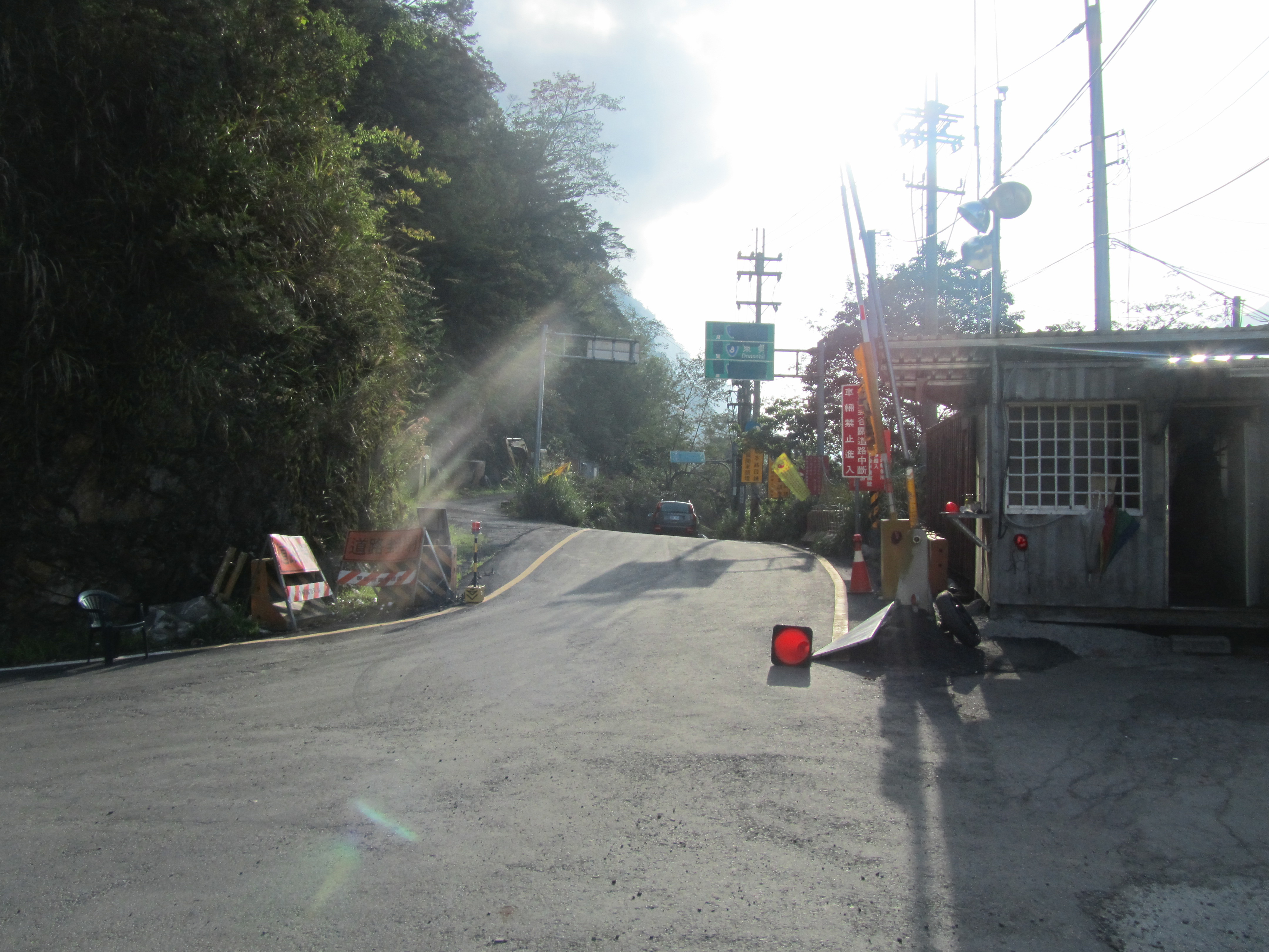 2011年4月5日當時，中橫自花蓮向西，公共可通行極限至德基發電廠為止，並設有管制站以限制續行至谷關的車流；現已將管制站東遷至原德基派出所，原管制站裁撤。目前遠處多通行右側岔路，原為台8甲青山下線，現為臨37便道；左側岔路為原中橫主線──青山上線，已永久廢棄。